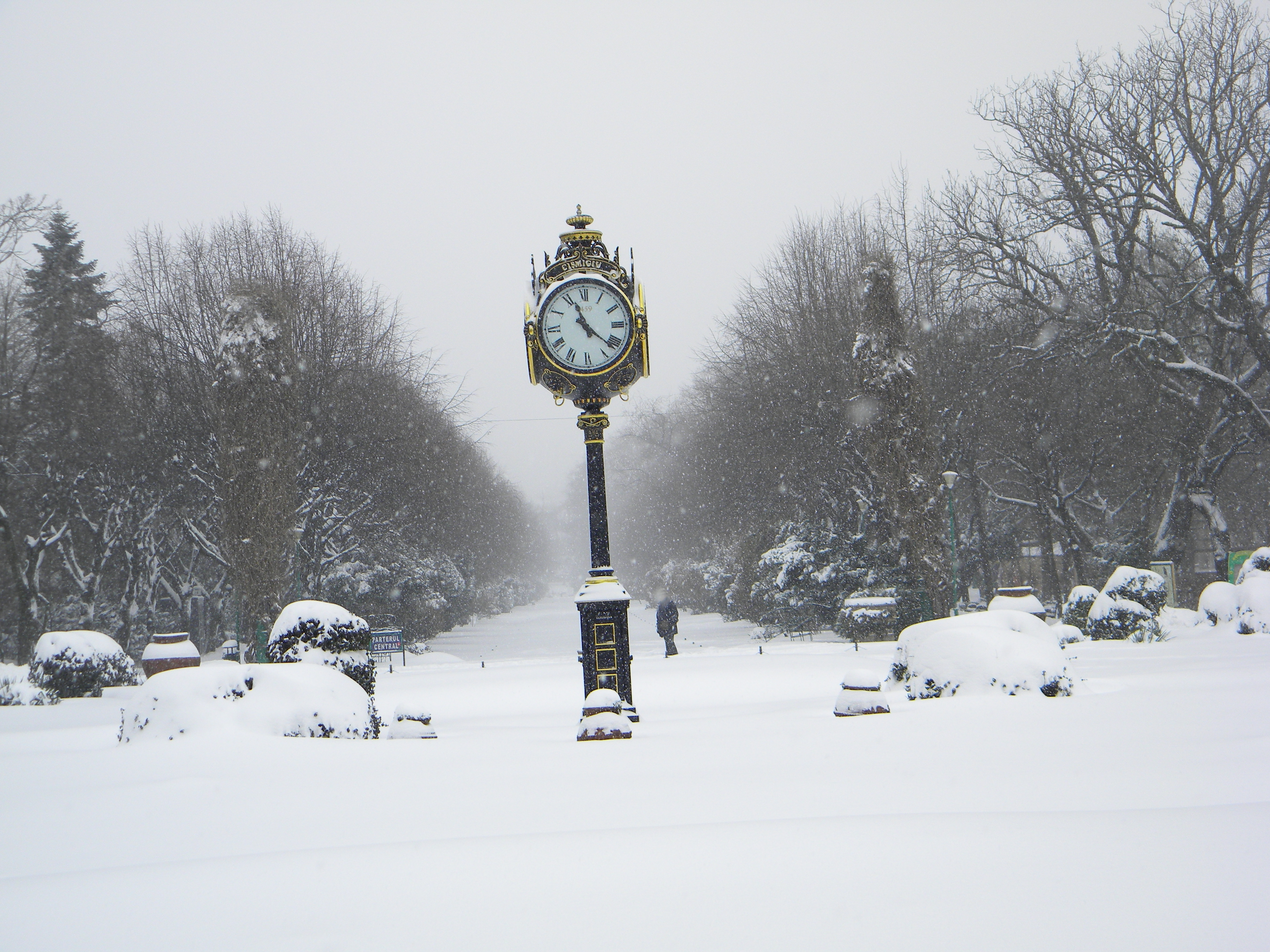 Bucuresti, Romania. Parcul Cismigiu. Ceasul numara minutele cand va veni PRIMAVARA. (Duduia se intreaba: Vine Primavara? -Nu vine draguta. Poate la anu).). 28 Februarie 2018)